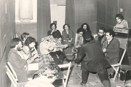 Le prima lezioni di musica di insieme alla Scuola Popolare di Musica di Testaccio